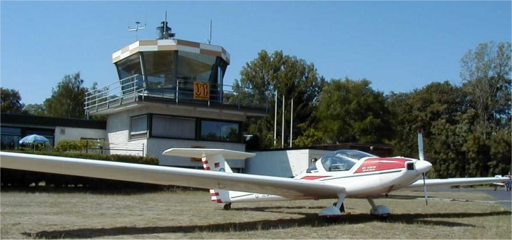 Grob G109A - Touringmotorsegler mit 2400 ccm Limbach Motor, erkennbar an der Mühlbauer-Luftschraube, G 109 - 2400 Schriftzug und dem blauen Umweltengel am Leitwerk.